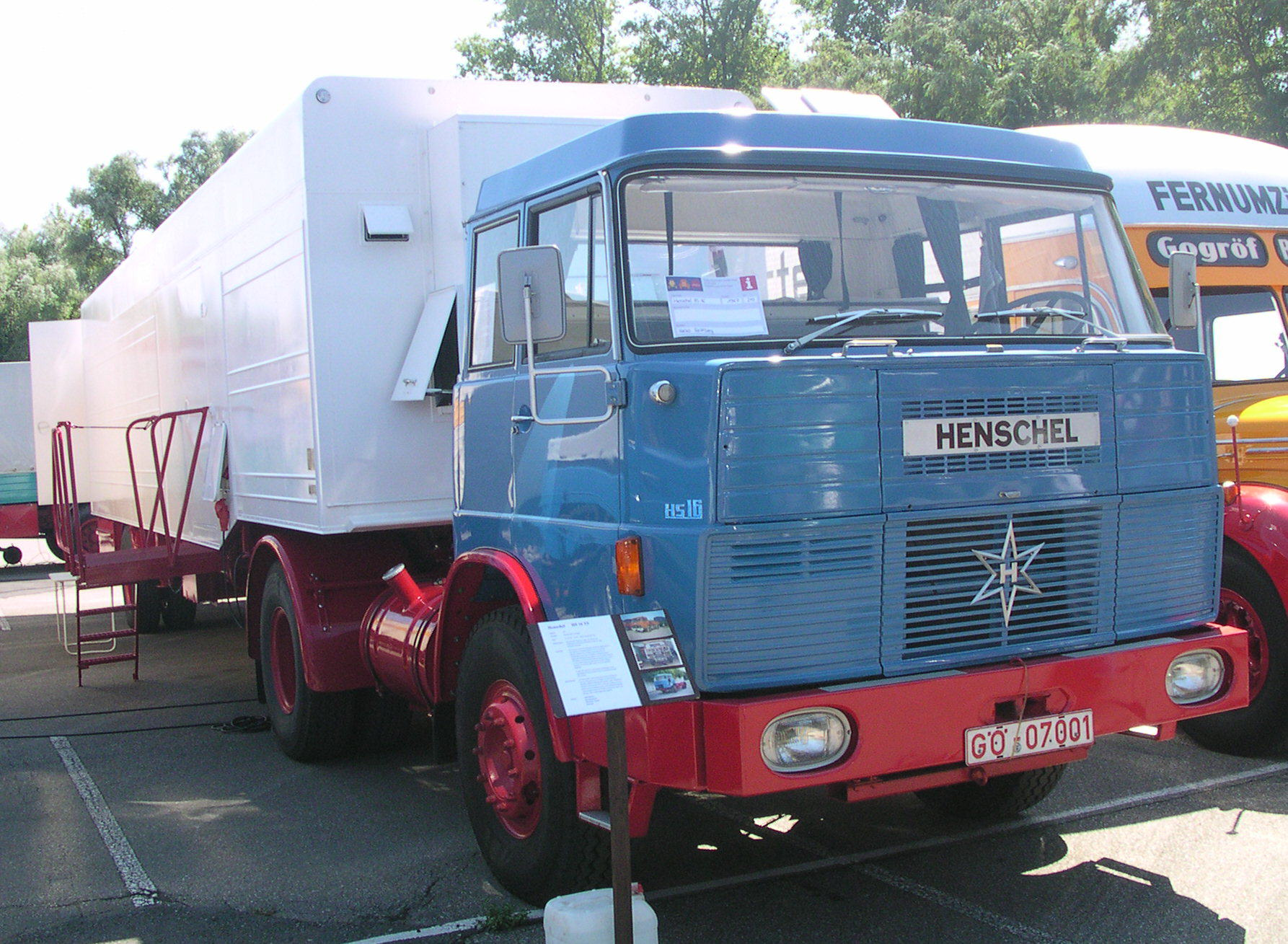 Wörth am Rhein, Oldtimer-Treffen bei Daimler-Chrysler Henschel HS 16 TS, Baujahr 1967, erstes kippbares Fahrerhaus bei Henschel, Motor 520 GU, 154 Kw